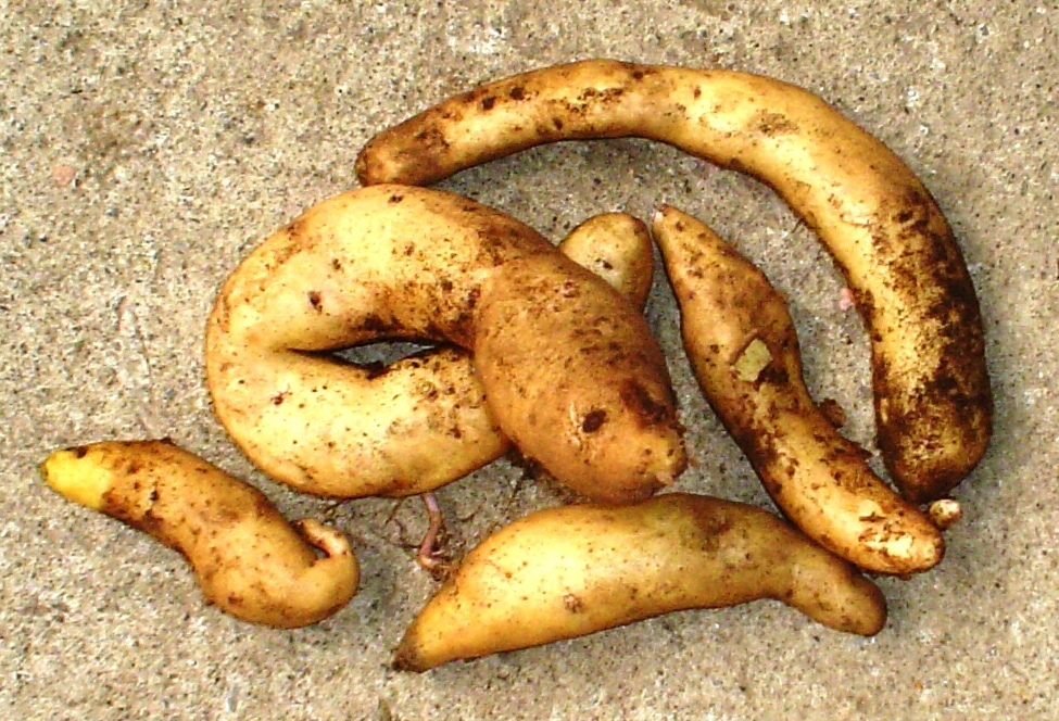 Tubérculos de papas (Solanum tuberosum subsp. tuberosum) de la variedad Michuñe Blanca, originaria de Chiloé.